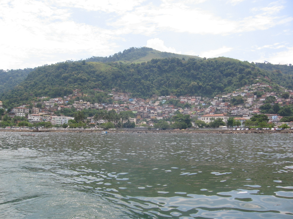 Port of Angra dos Reis, Rio de Janeiro, Brazil. author: Giovanni Fattori (same uploadder)& Fabiana Consales, february 06 2006.